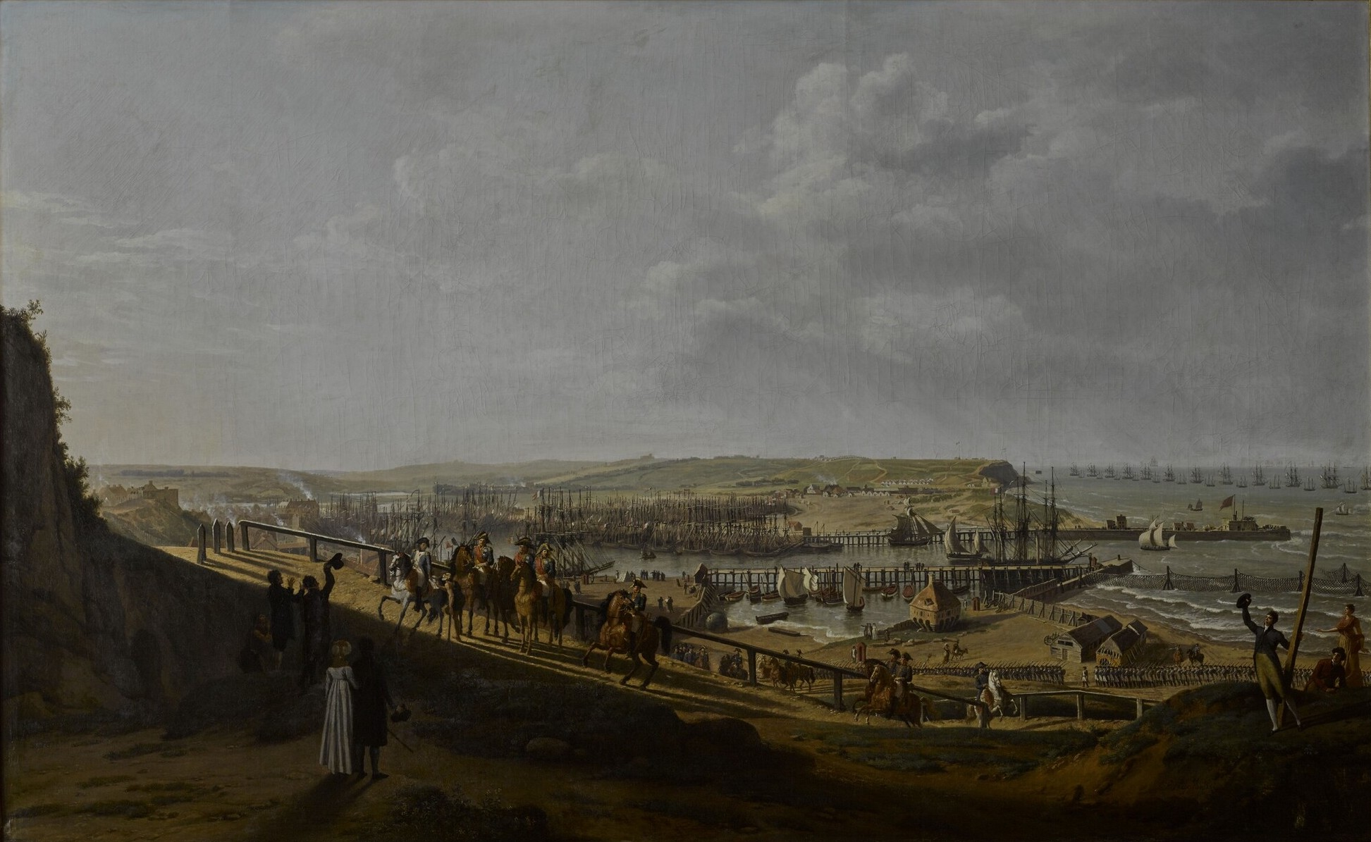 Napoléon visitant le camp où se rassemble son armée avec une flotte pour débarquer en Angleterre. Juillet 1804. Salon de 1806, n°265 ; envoyé à Versailles, 3 septembre 1834. Dimensions : 160,5 x 261,8 cm. Cadre : 178,3 x 277,5 cm. Matière et technique : huile sur toile.